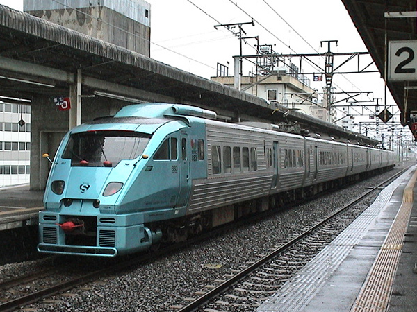 中津駅下り3番線に停車中のJR九州883系電車（リニューアル前）